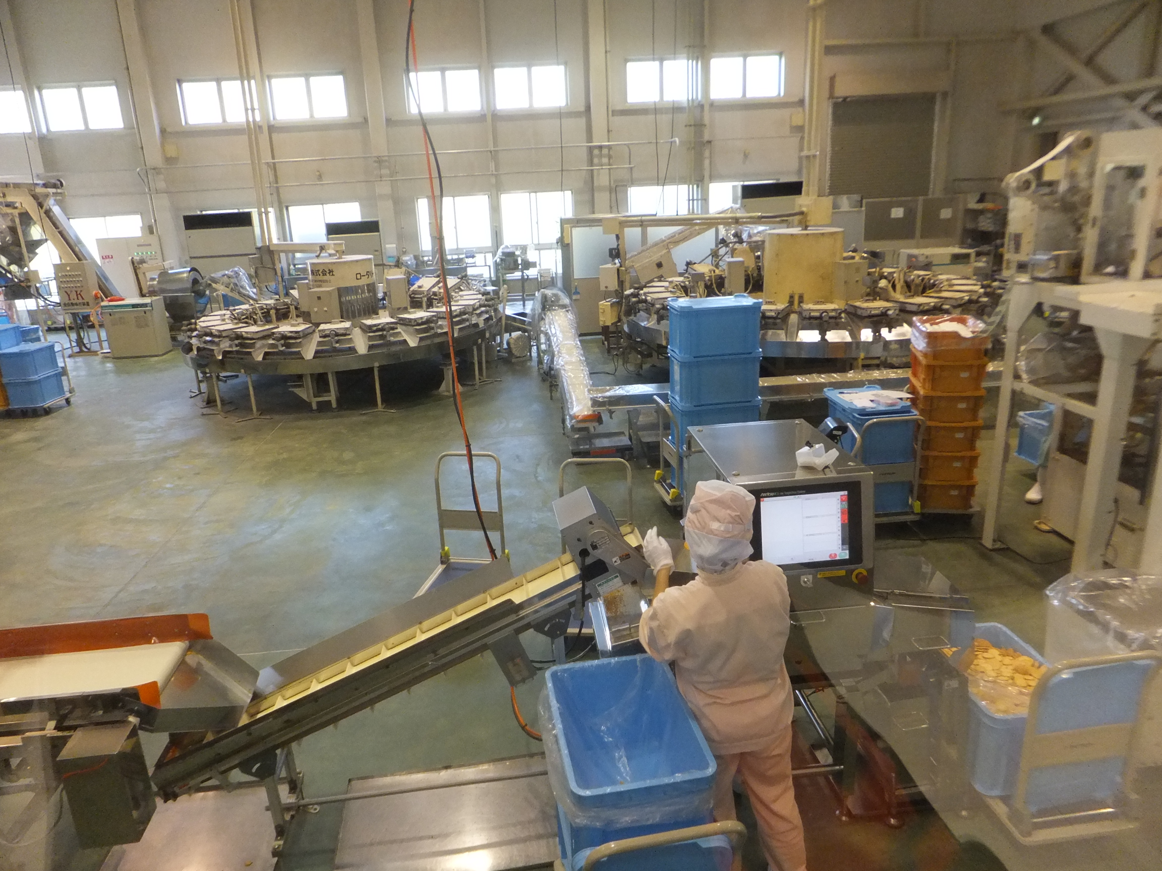 蛸せんべいを製造している工場 Fujifilm FinePix F600EXR